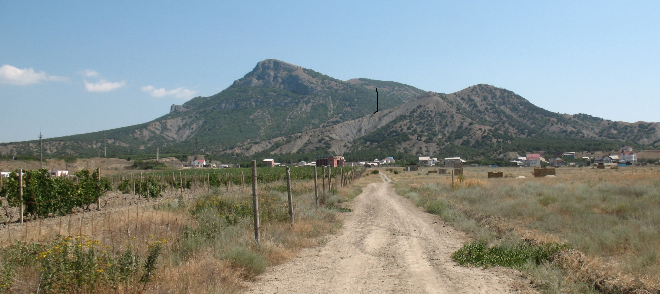 Вигляд гори Ай-Георгій з Судаку